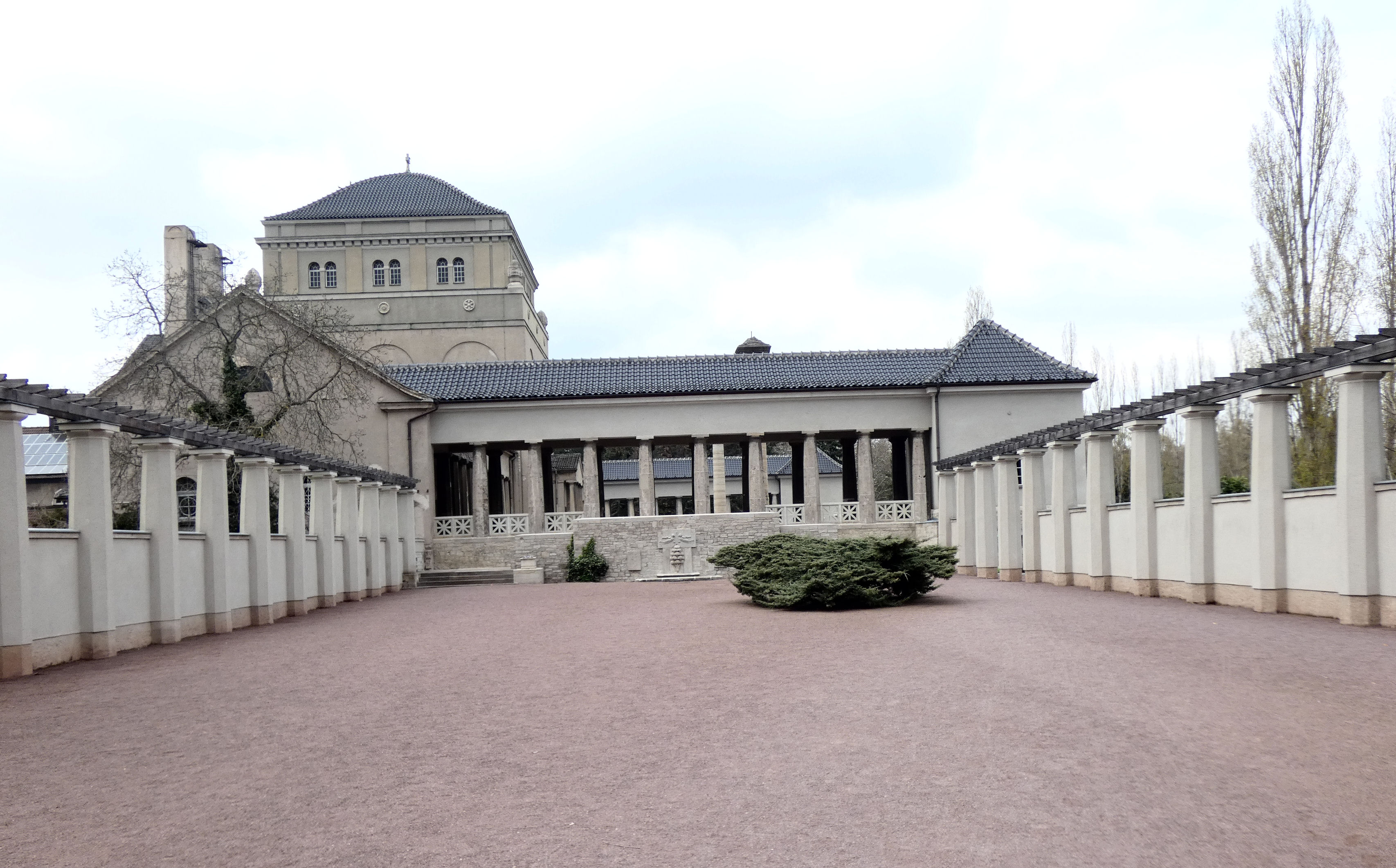 Gertraudenfriedhof, Landrain, Halle (Saale)